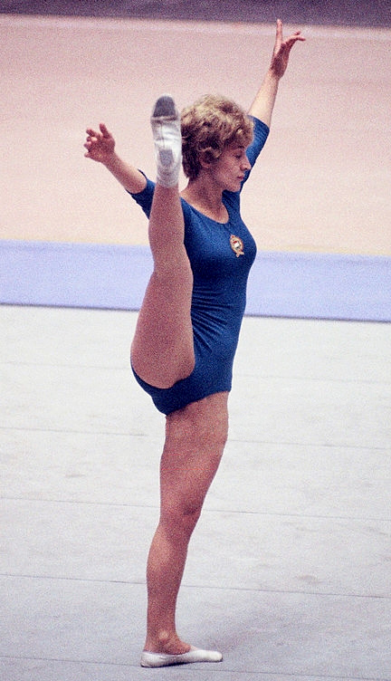 Anikó Ducza-Jánosi at the 1964 Olympics